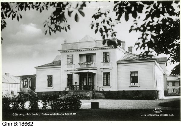 Bethianiastiftelsen nursery home, Göteborg. Former Jakobsdal mansion.